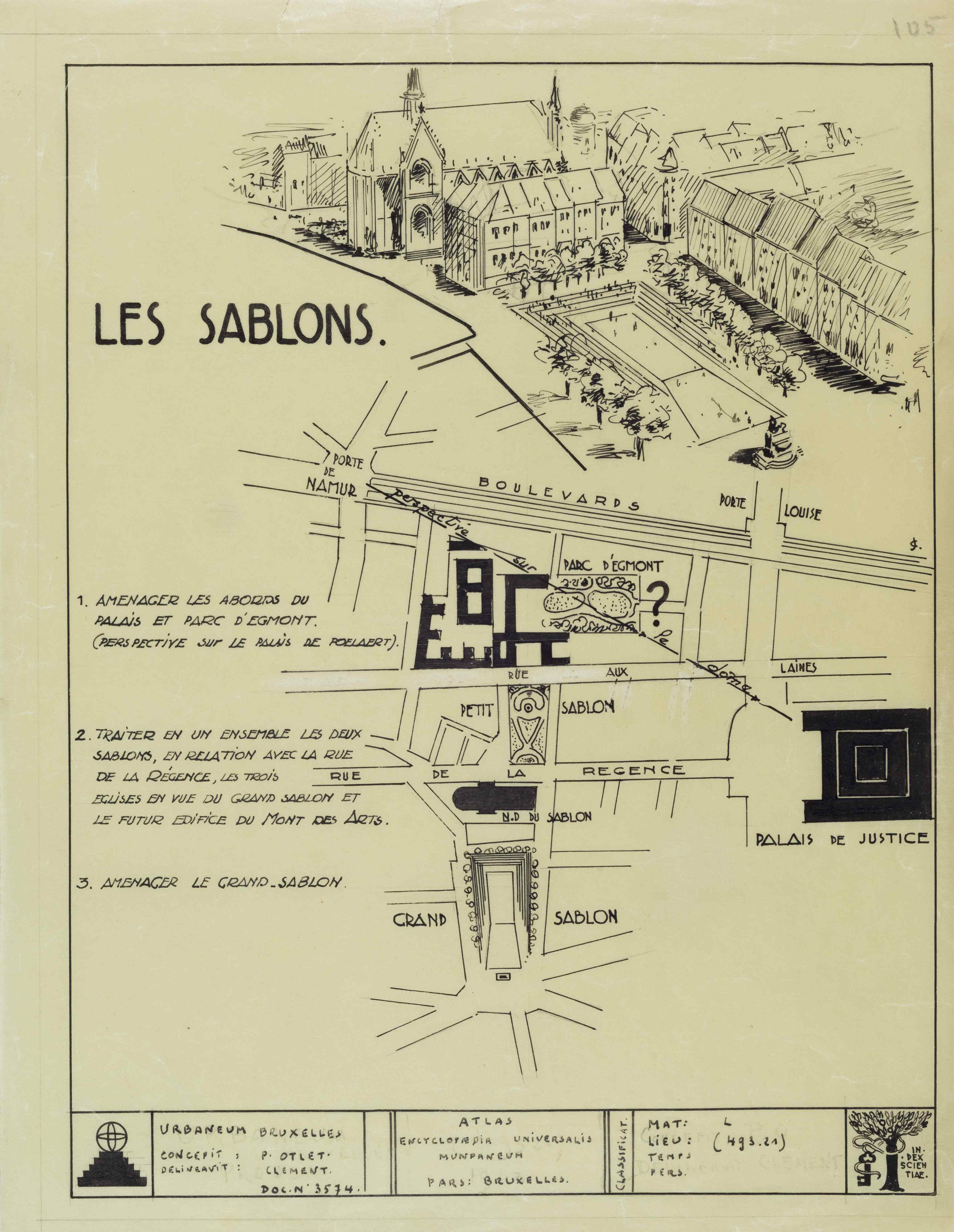 Encyclopedia Universalis Mundaneum : Projet d'aménagement des Sablons.